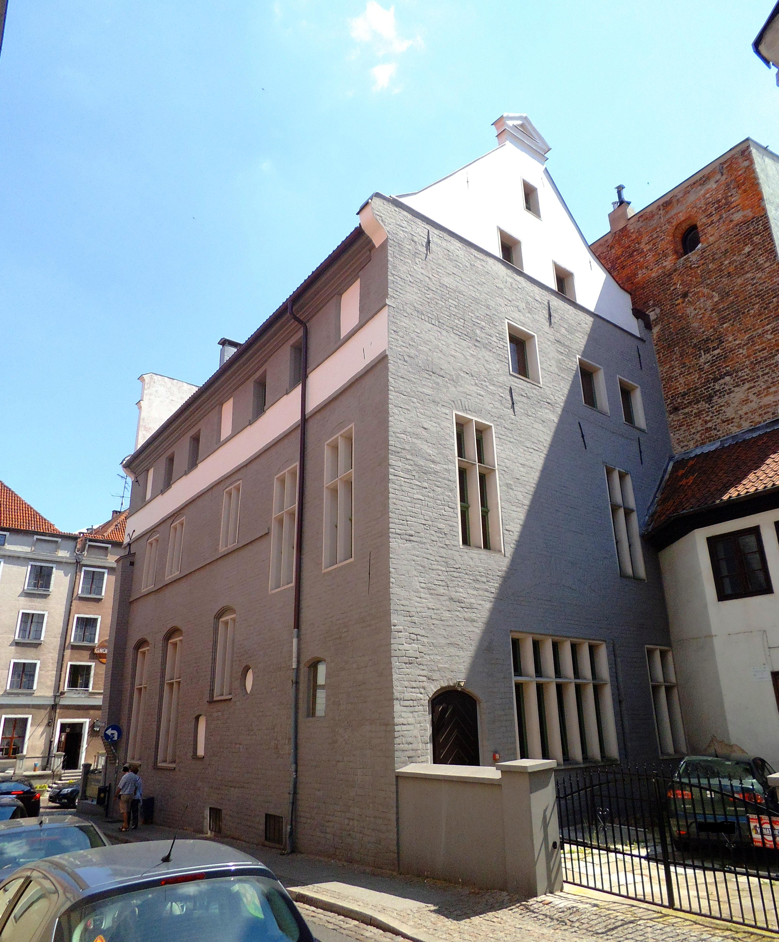 Muzeum Diecezjalne w Toruniu1